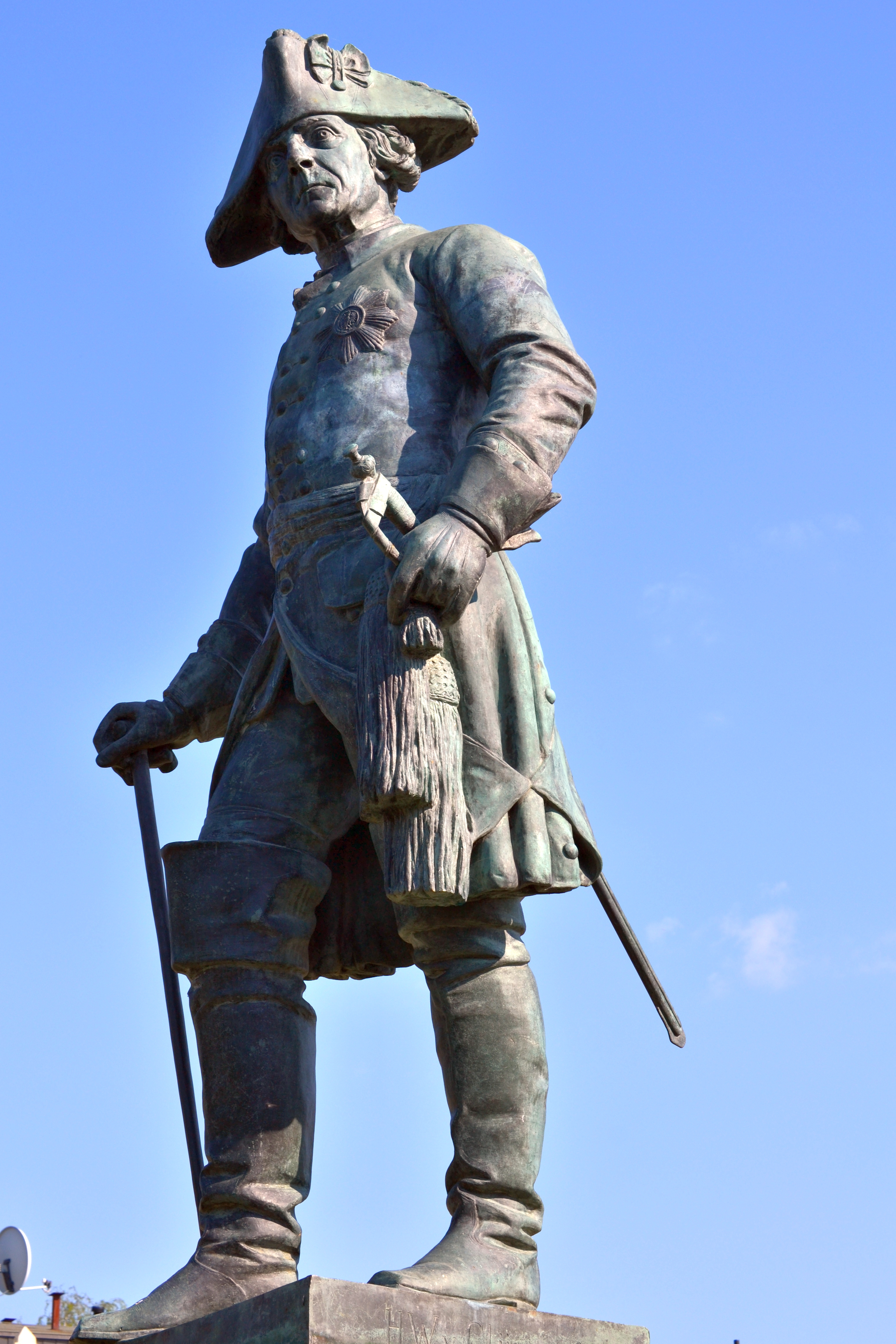 Denkmal für Friedrich II. in der Friedrichstraße Letschin.